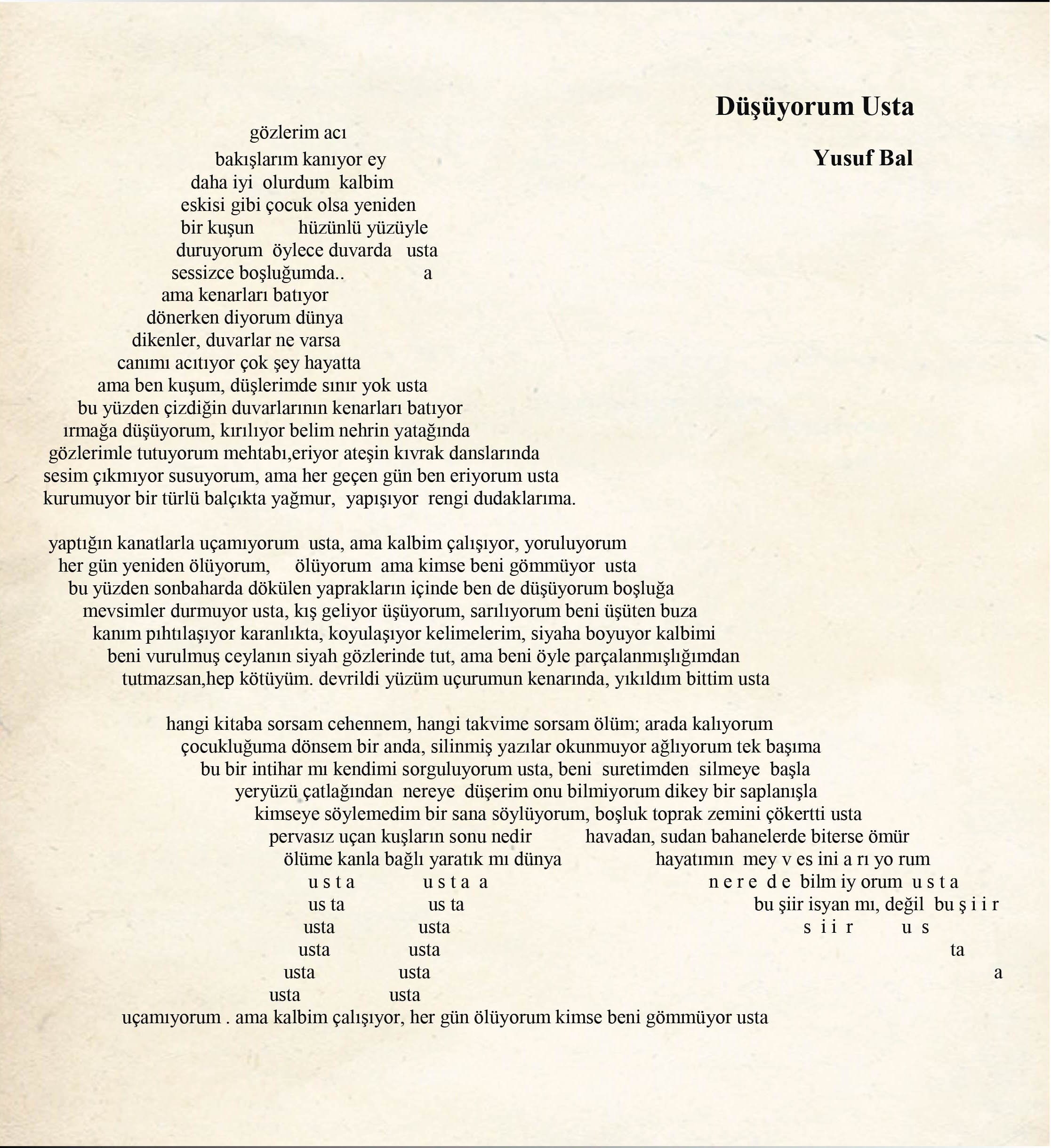 Düşüyorum Usta, Yusuf Bal